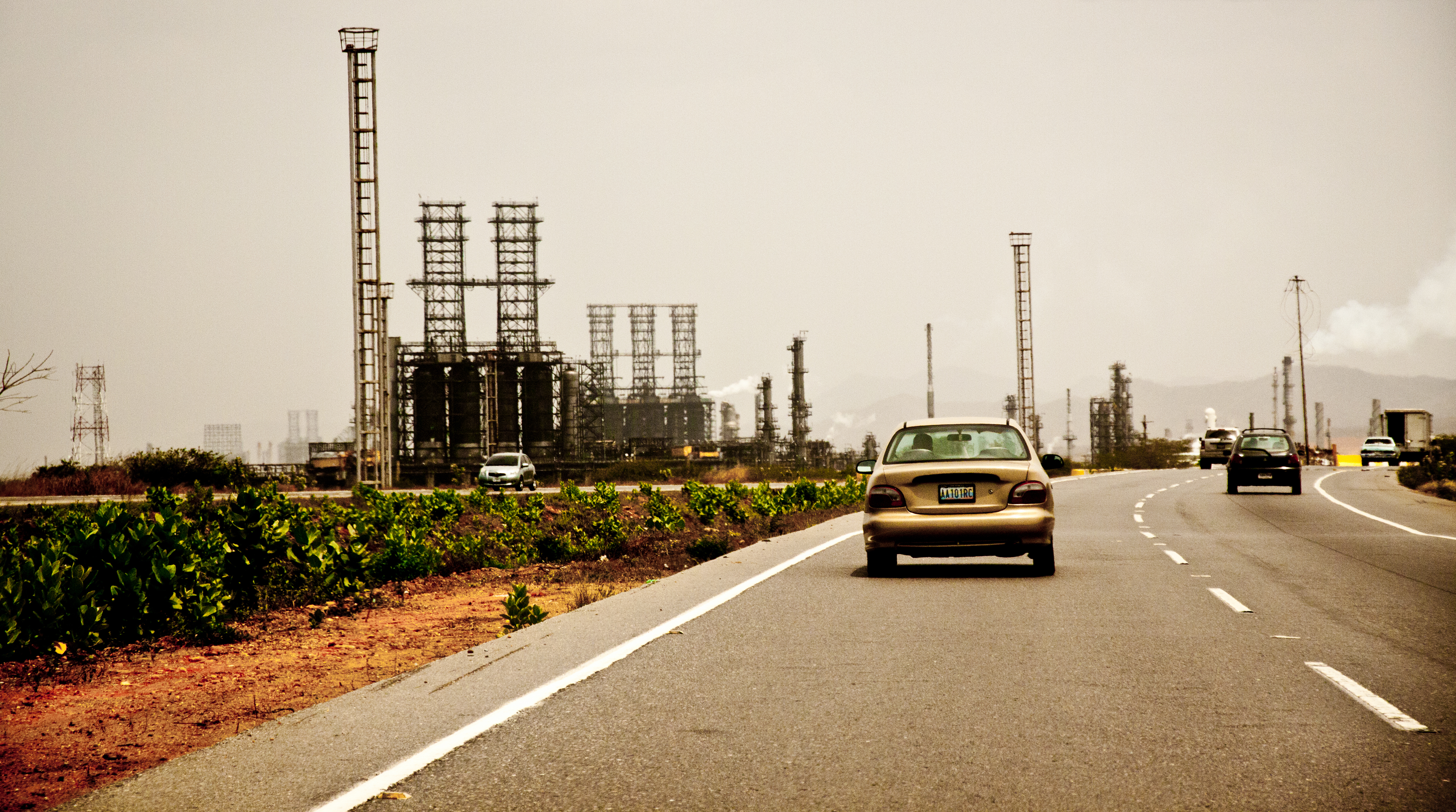 Una de las refinerías mas importantes de Venezuela, ubicada en la vía de Puerto Píritu - Puerto La Cruz.